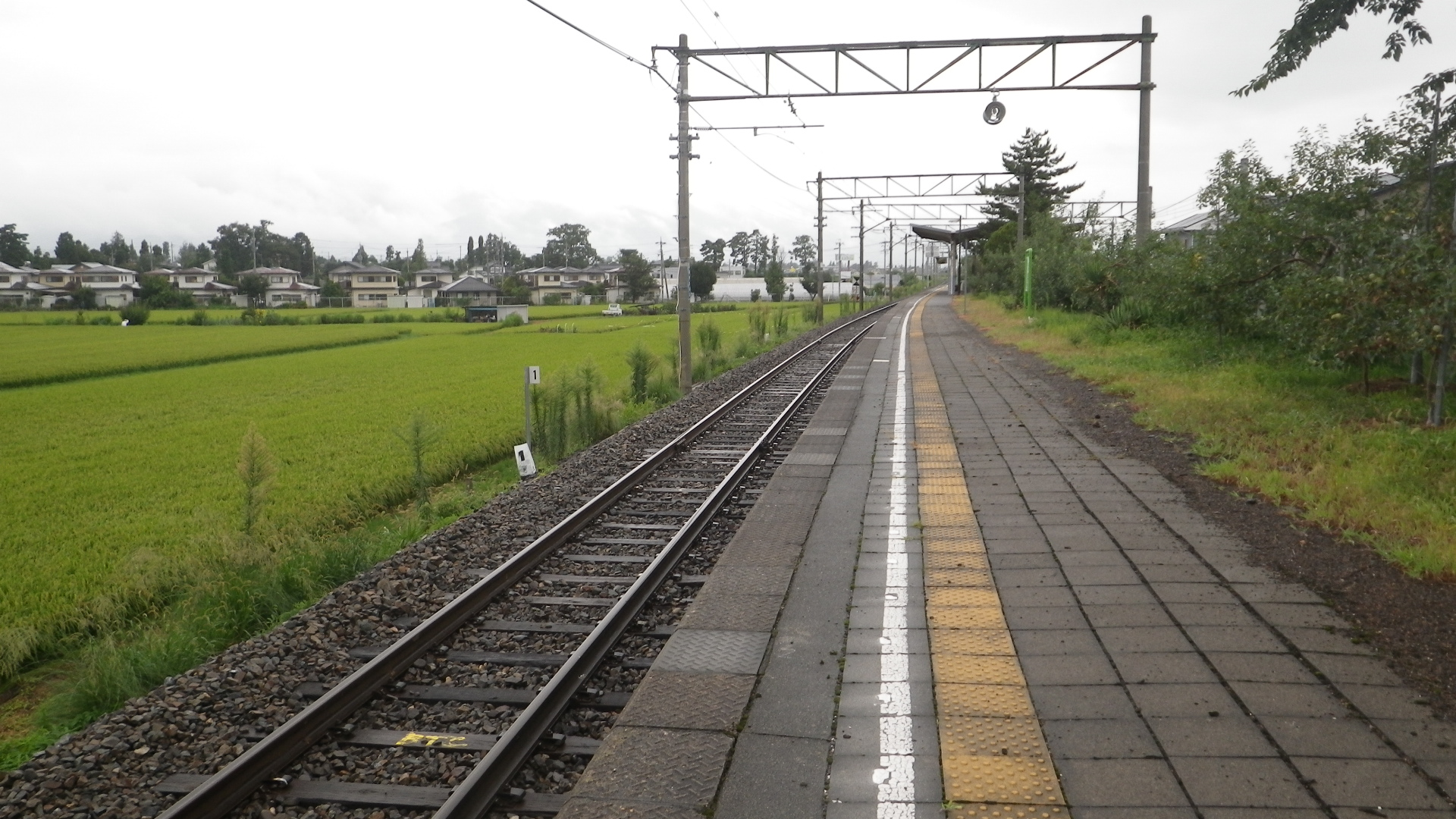 JR東日本大糸線梓橋駅ホームです。島高松方より撮影しました。